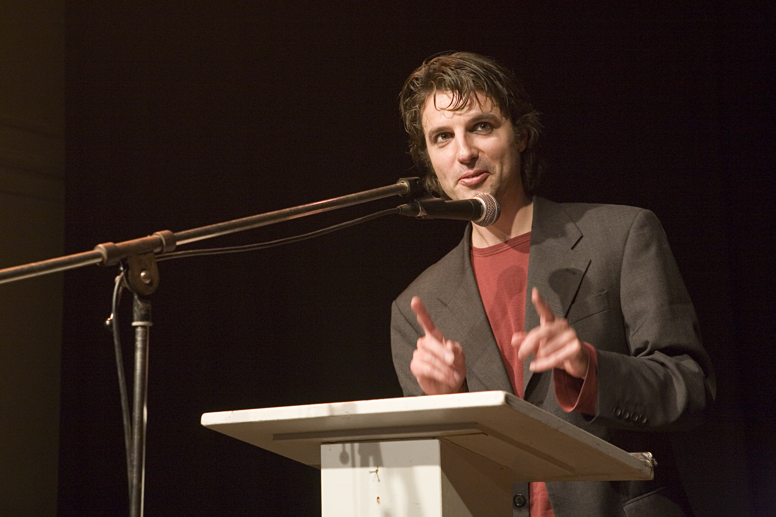 Dichter Willem Thies in poëziehuis Perdu in Amsterdam.